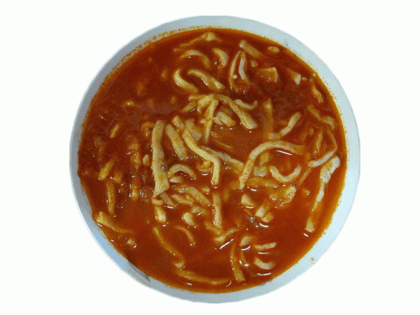 Рибљи паприкаш сервиран са домаћим тестом-резанцима